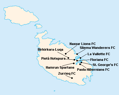 Répartition des clubs en Premier League Maltaise 1994-1995.